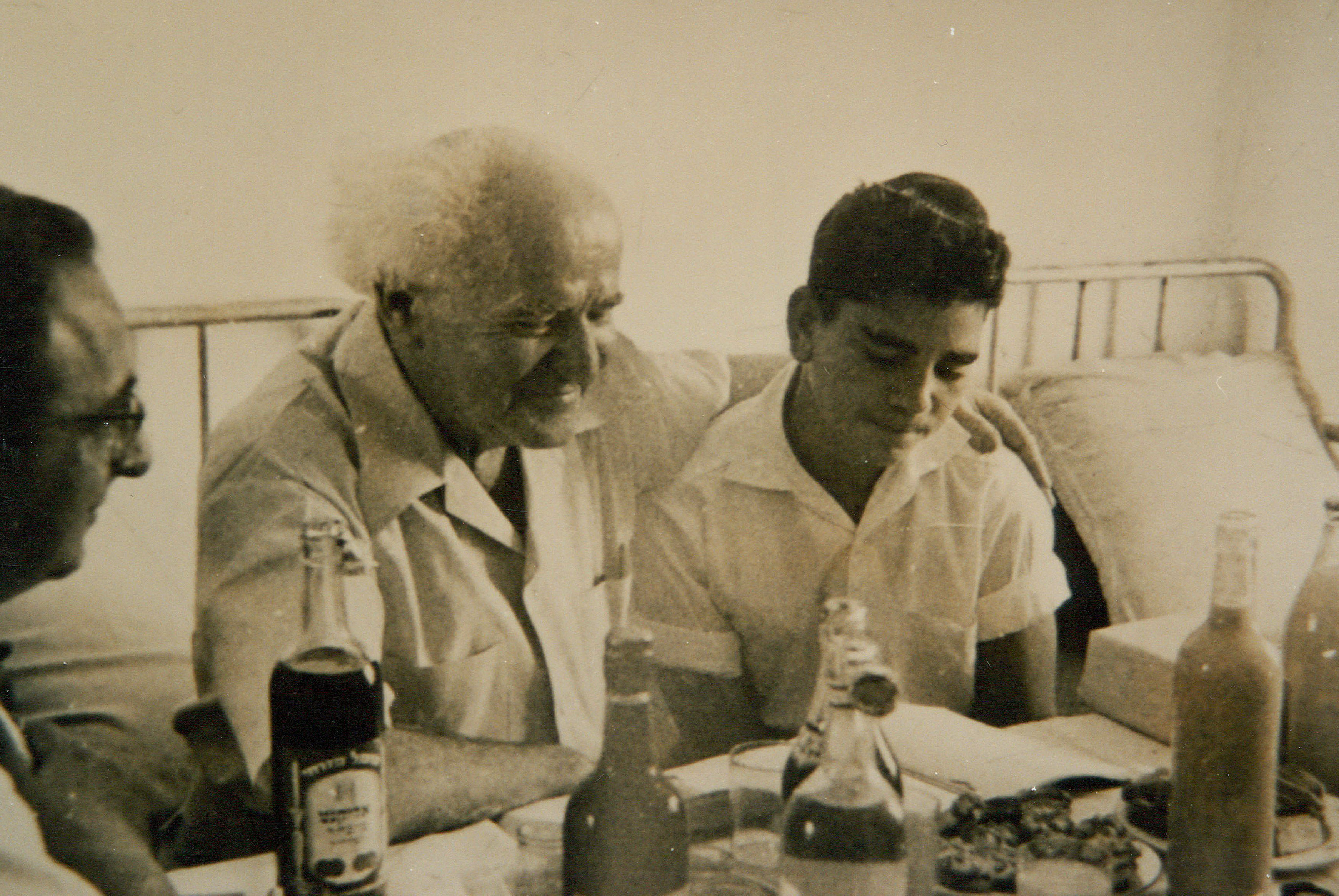 ביקור בן גוריון מחבק את שמעון בבית שיטרית